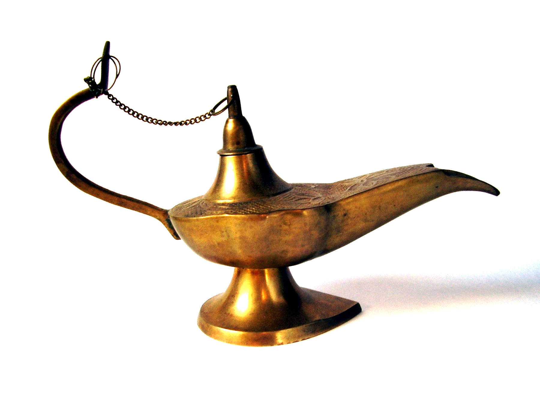 Antiga lamparina indiana. Old lamp from India.